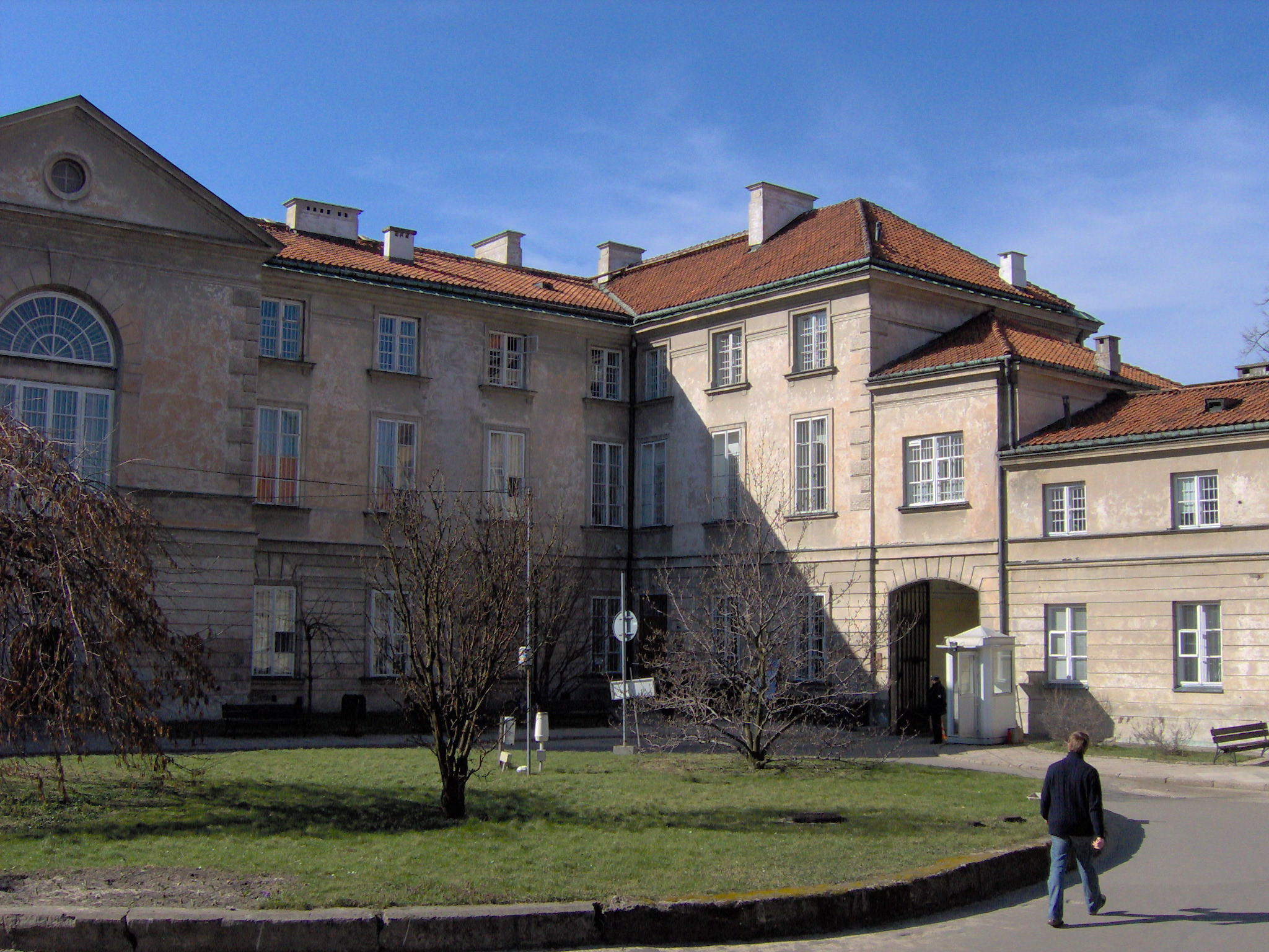 Biuro Programu Stypendialnego im. Konstantego Kalinowskiego w Pałacu Potockich